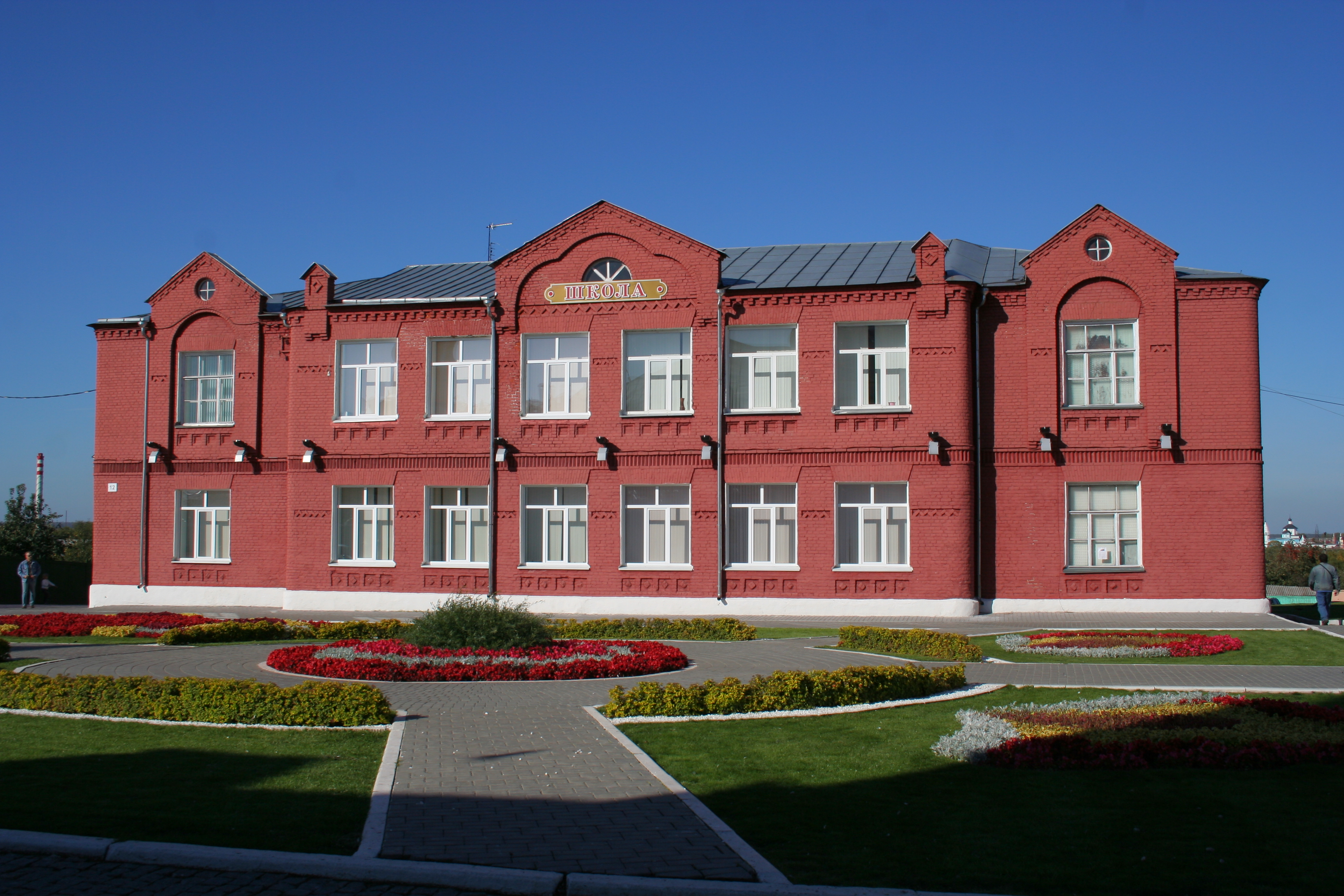 Коломенский кремль. Школьное здание.